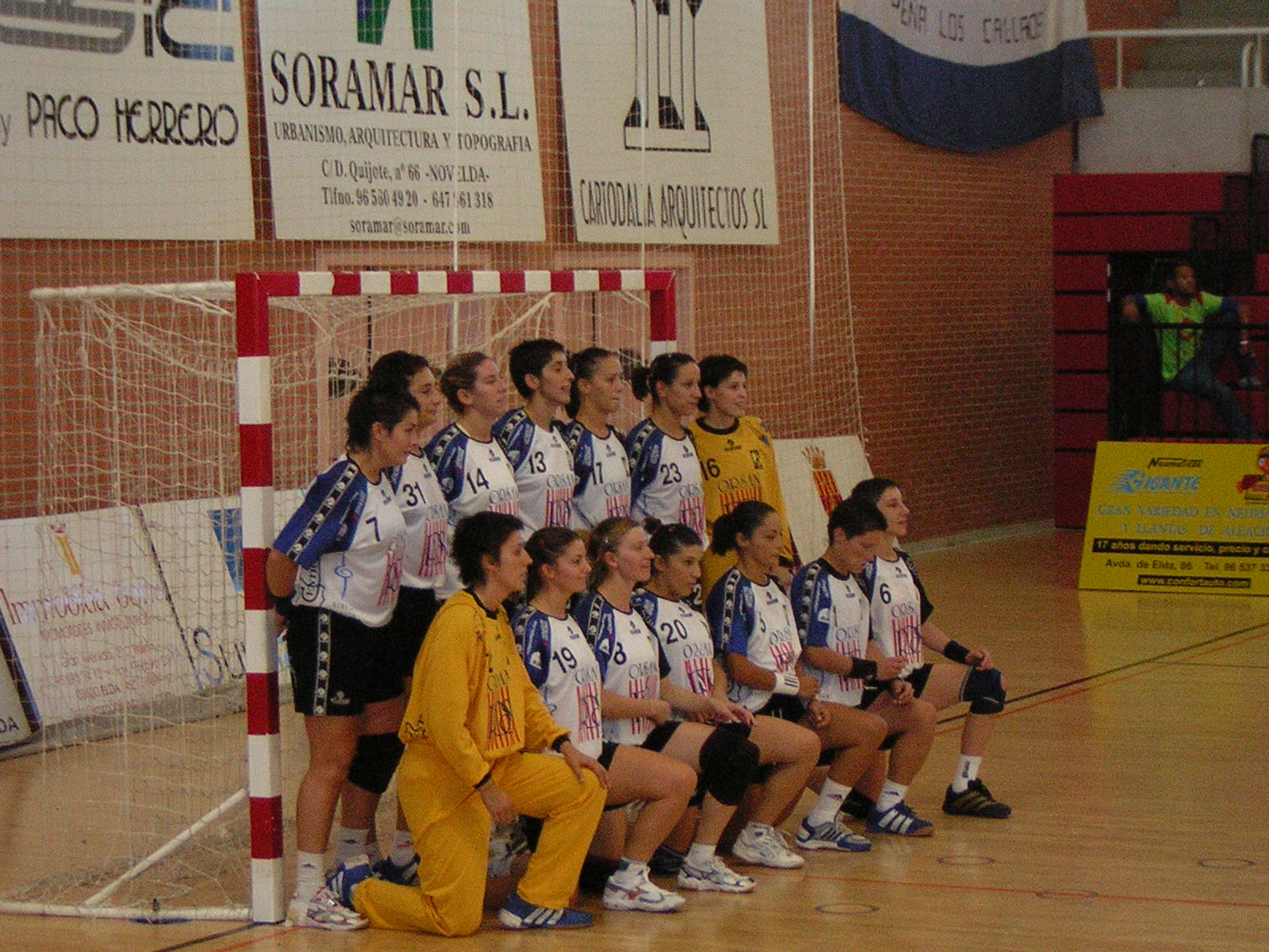 Plantilla del Orsan Elda Prestigio (2004/2005). Fotografía tomada en el partido que enfrentaba al Orsan Elda Prestigio y el Mar Sagunto.